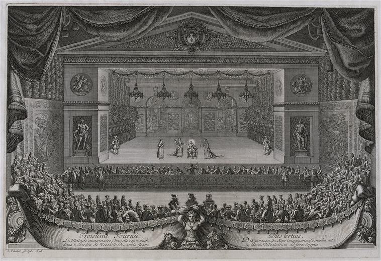 La Fête donnée par Louis XIV pour célébrer la reconquête de la Franche-Comté en 1674 - Représentation du Malade Imaginaire de Molière devant la grotte des Jardins du Château de Versailles.